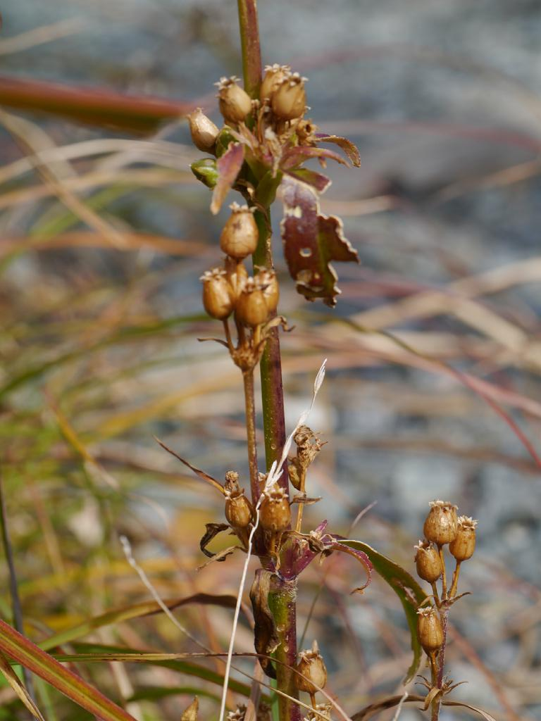 Silene firma：フシグロ 2016/11/13 生石山（和歌山県）：Mount Oisi(Wakayama Pref,)